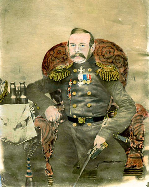 Russian admiral Lavrov